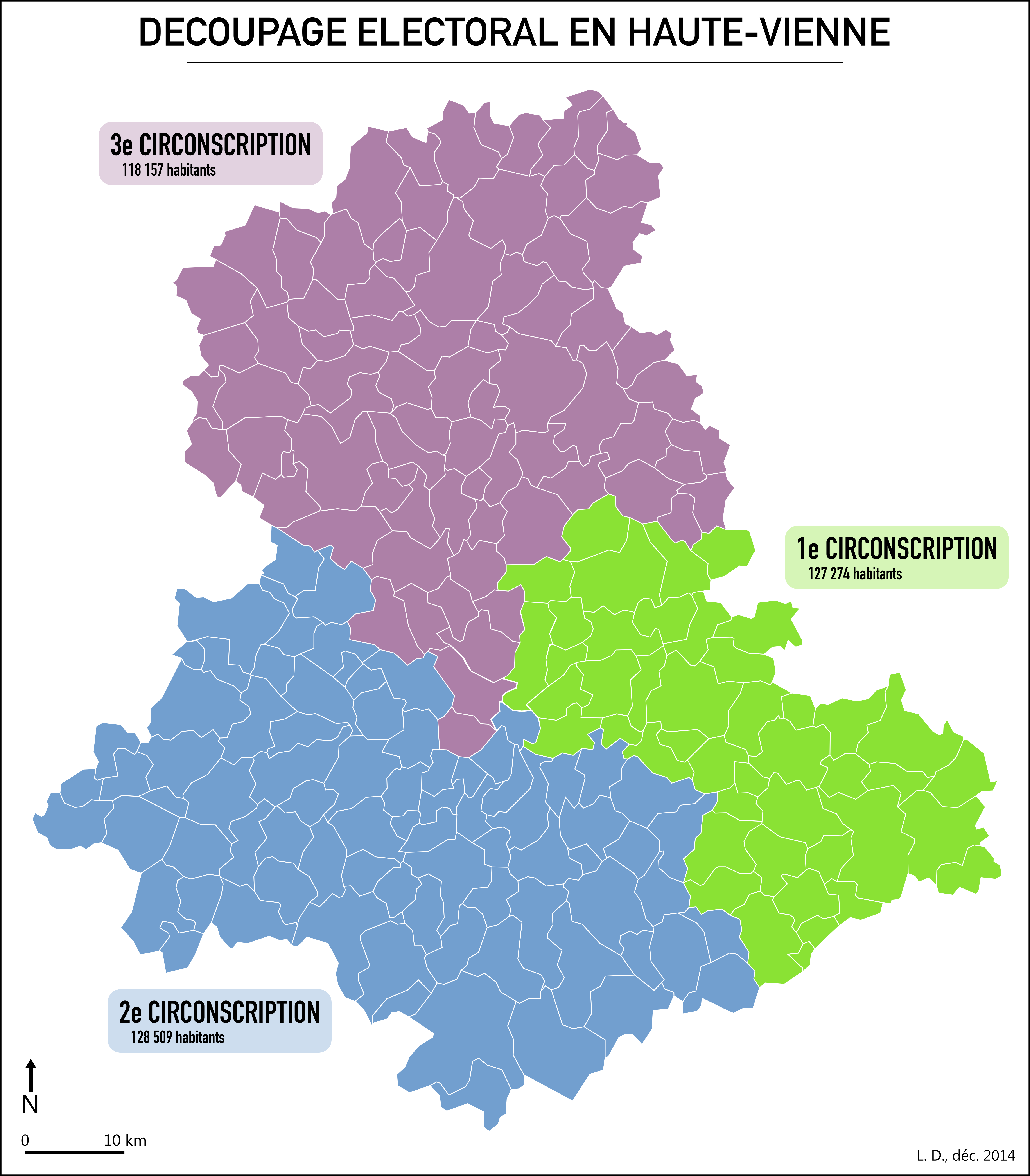 Carte des trois circonscriptions électorales de Haute-Vienne.